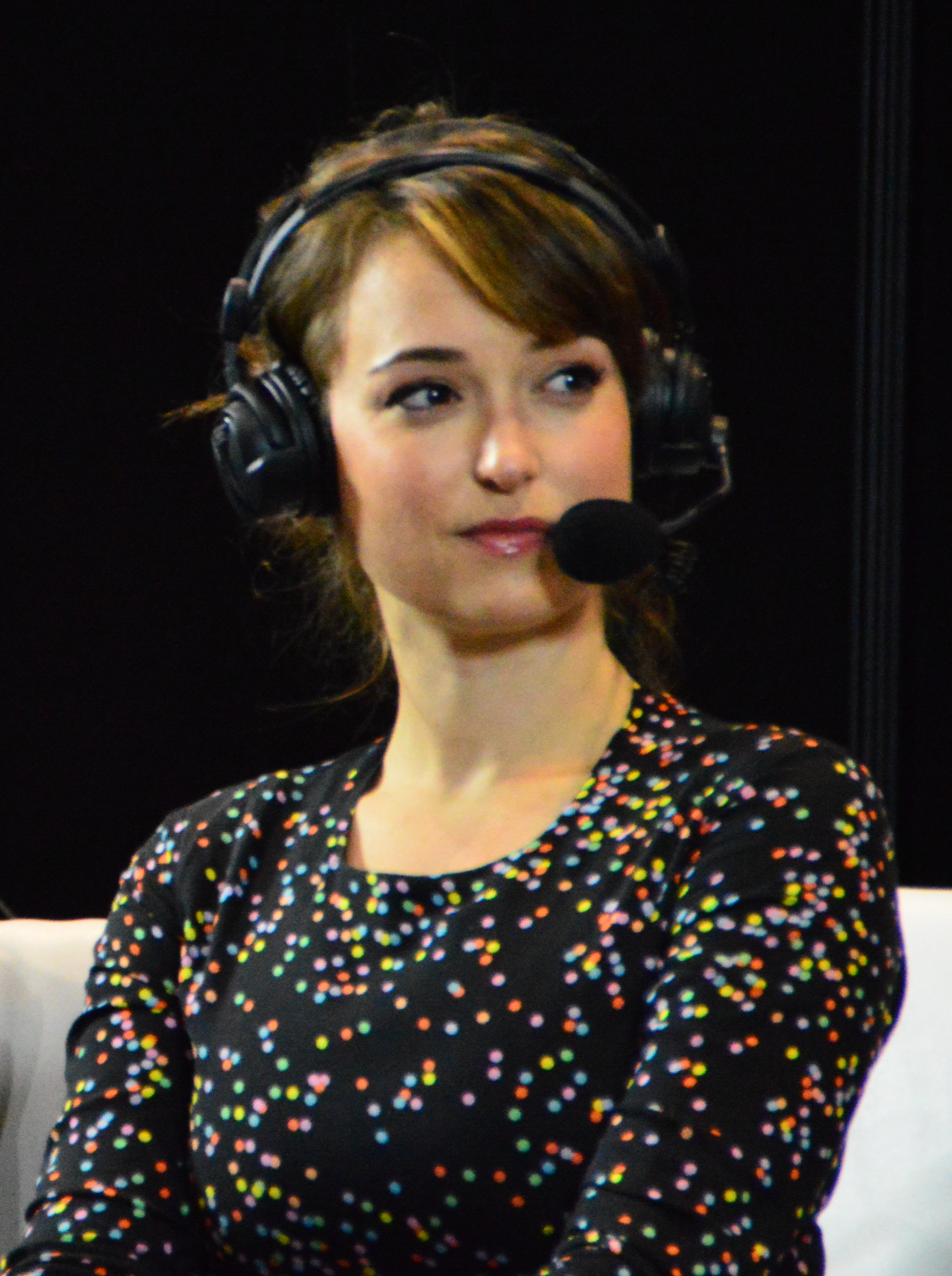 C2E2 2015